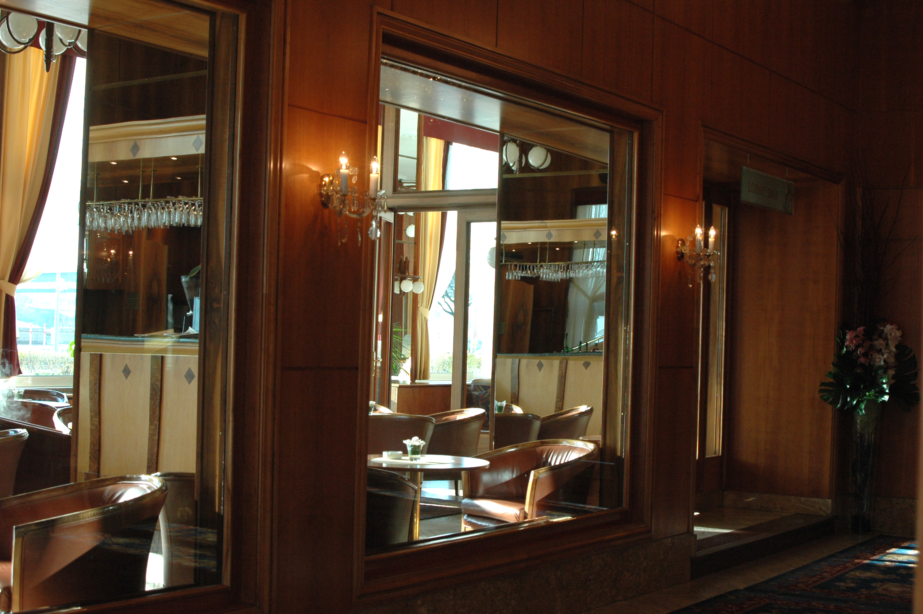 hotel devin nratislava bellus detail